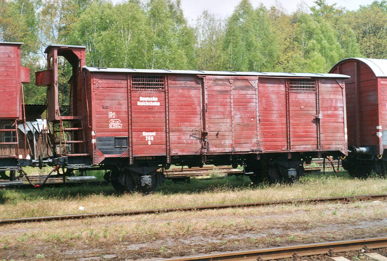 Güterwagen der DRG